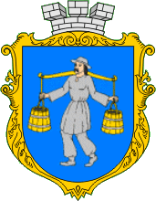 Герб Борислава Герб міста Борислав Львівської області.Затверджений 23 липня 1996 року рішенням VI сесії Бориславської міської ради. У лазуровому полі ріпник у срібній одежі несе на плечах золоте коромисло з двома золотими відрами нафти (ропи). Щит обрамований декоративним картушем i увінчаний срібною міською короною з трьома вежами. Ріпник відомий з давніх печаток громади міста з XIX і вказує на нафтодобувні промисли, що спричинилися до розвитку Борислава. Гречило Андрій Богданович.